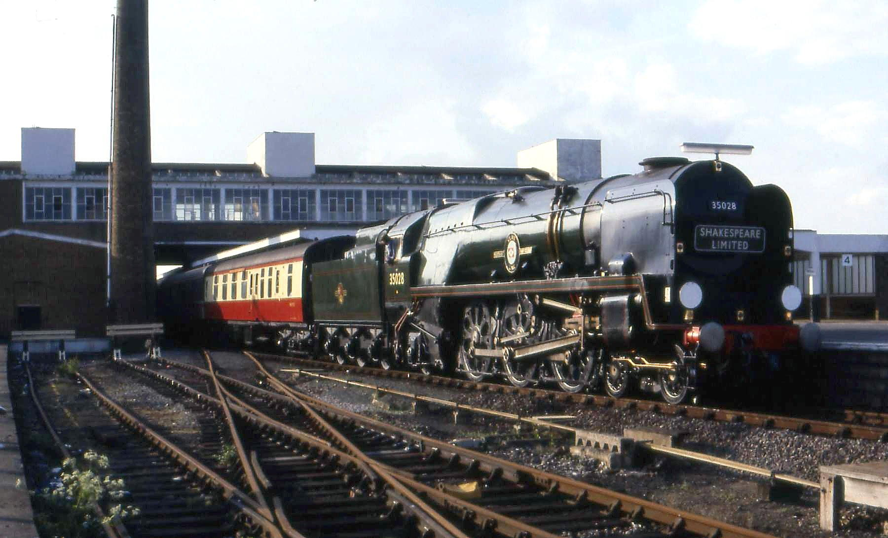 35028 Banbury